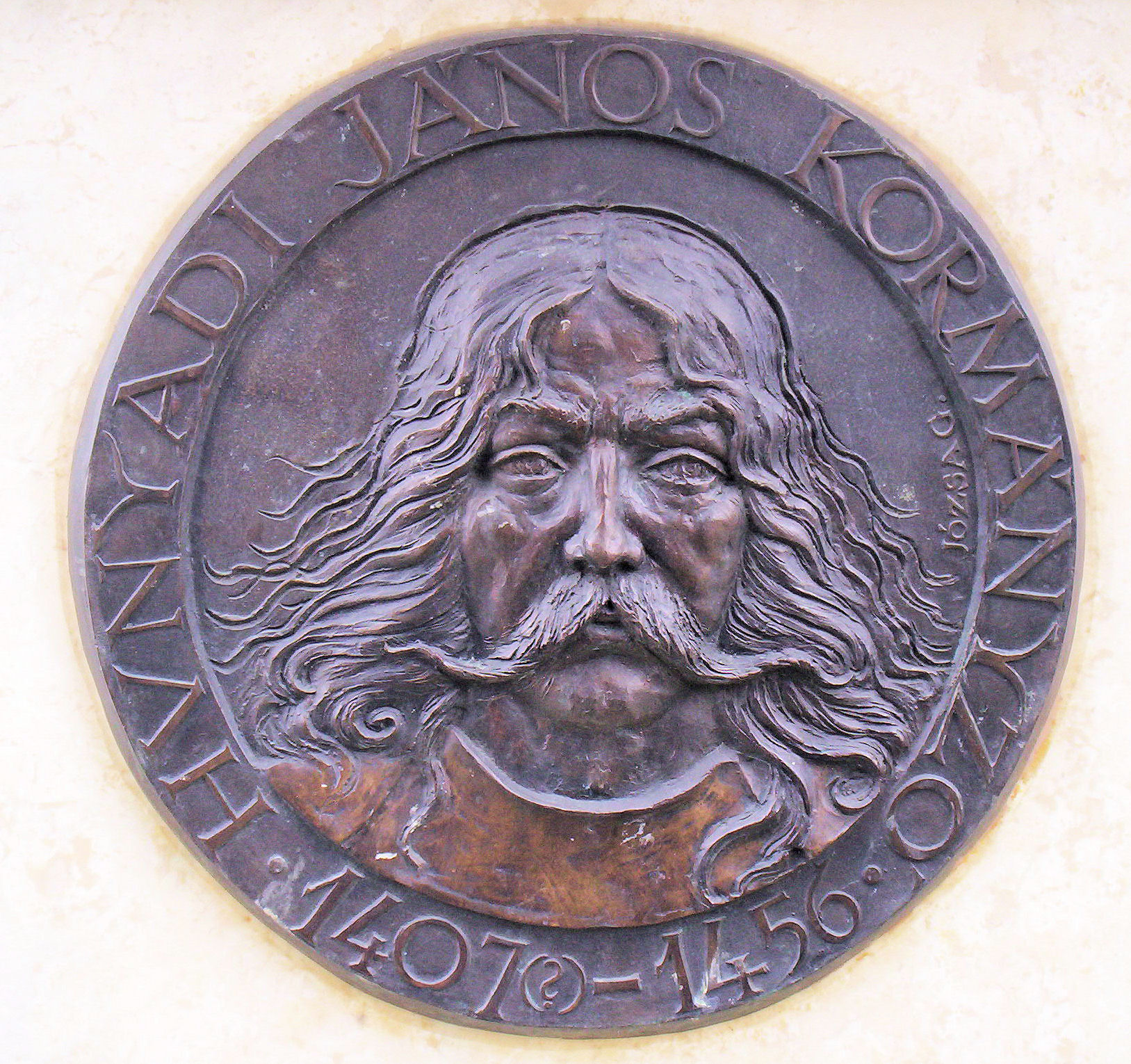 Hunyadi János. Dombormű a szegedi Hunyadi Mátyás-szobor talapzatán – photo taken by uploader User:Csanády in 2006. other version: File:JózsaGáborHunyadiJánosKJ.jpg